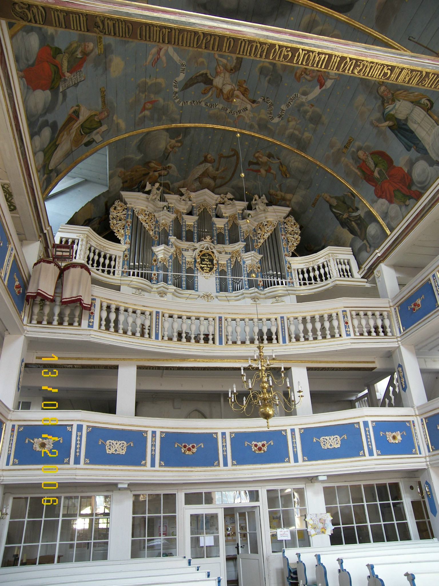 Kirche St. Lukas in Mühlberg (Thüringen), Innenansicht von Empore mit Orgel.